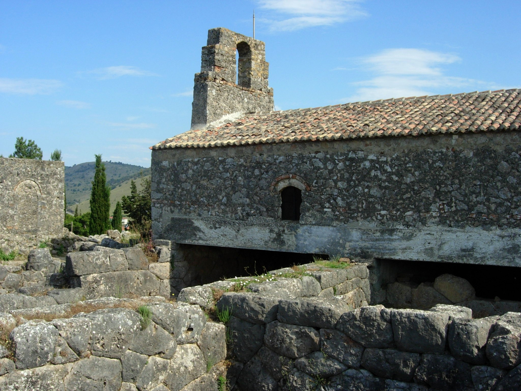 Nekromanteionin oraakkeli.